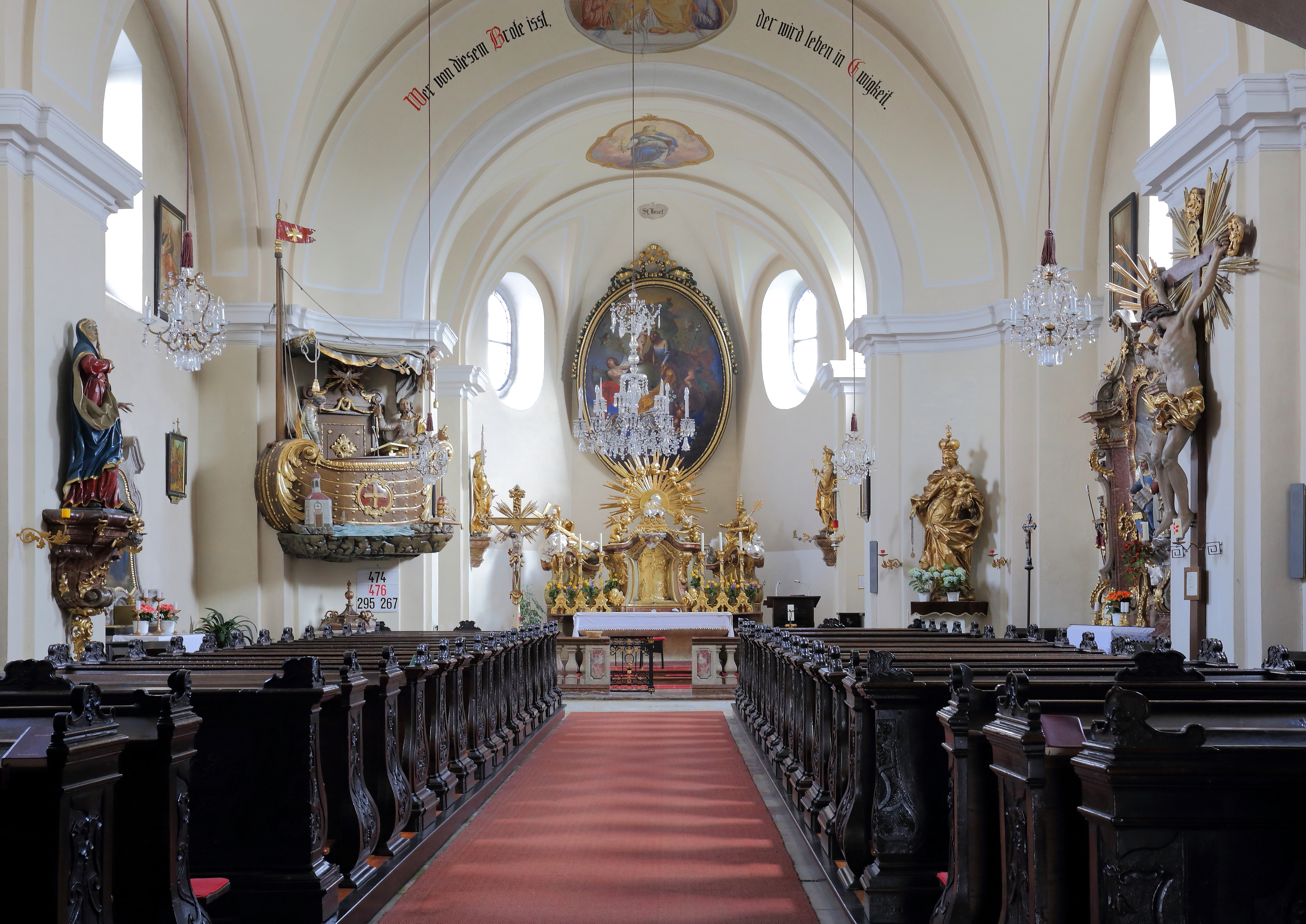 Innenansicht der katholischen Pfarrkirche hl. Josef in Tautendorf, ein Ortsteil der niederösterreichischen Marktgemeinde Gars am Kamp.